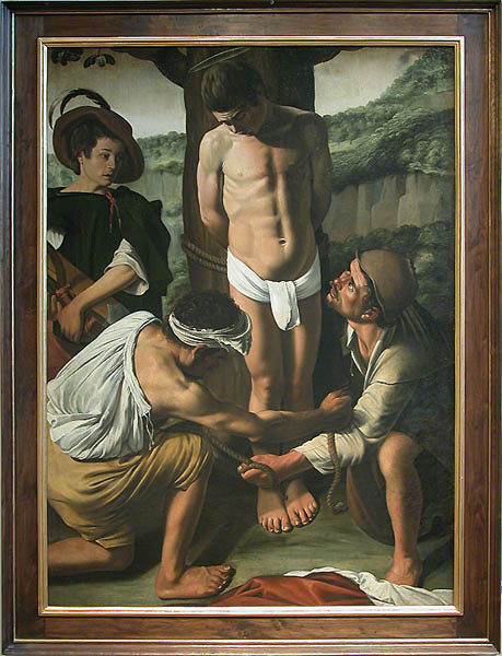 Biagio Manzoni, Martirio di San Sebastiano, Parigi, Louvre